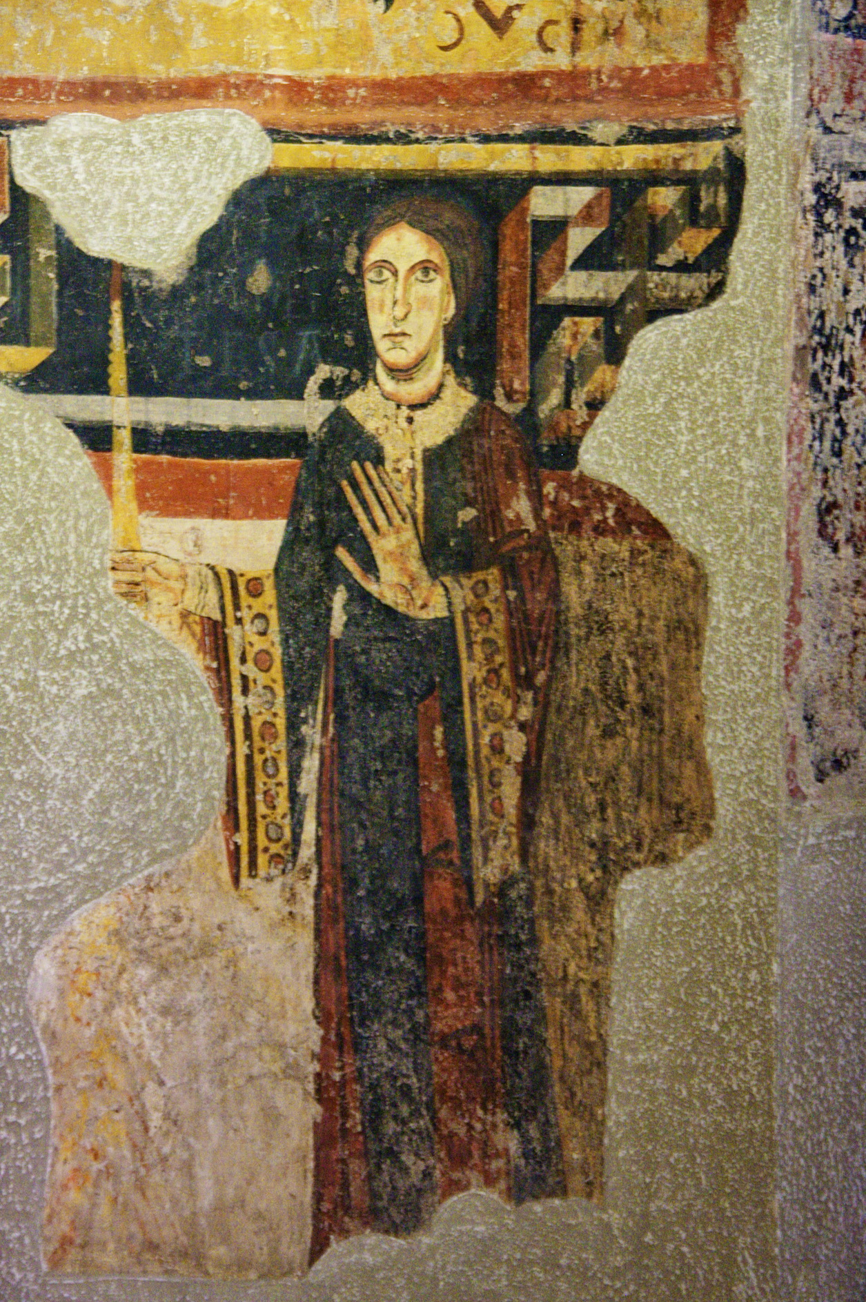 El conjunt pictòric comprèn la decoració de l'absis i la de l'arc triomfal, més set altres fragments, la majoria amb escasses restes pictòriques, així com el mural o palimpsest amb dos estrats de pintura conservat in situ. Procedeix de l'antiga església de Sant Pere del Burgal (la Guingueta d'Àneu, Pallars Sobirà).